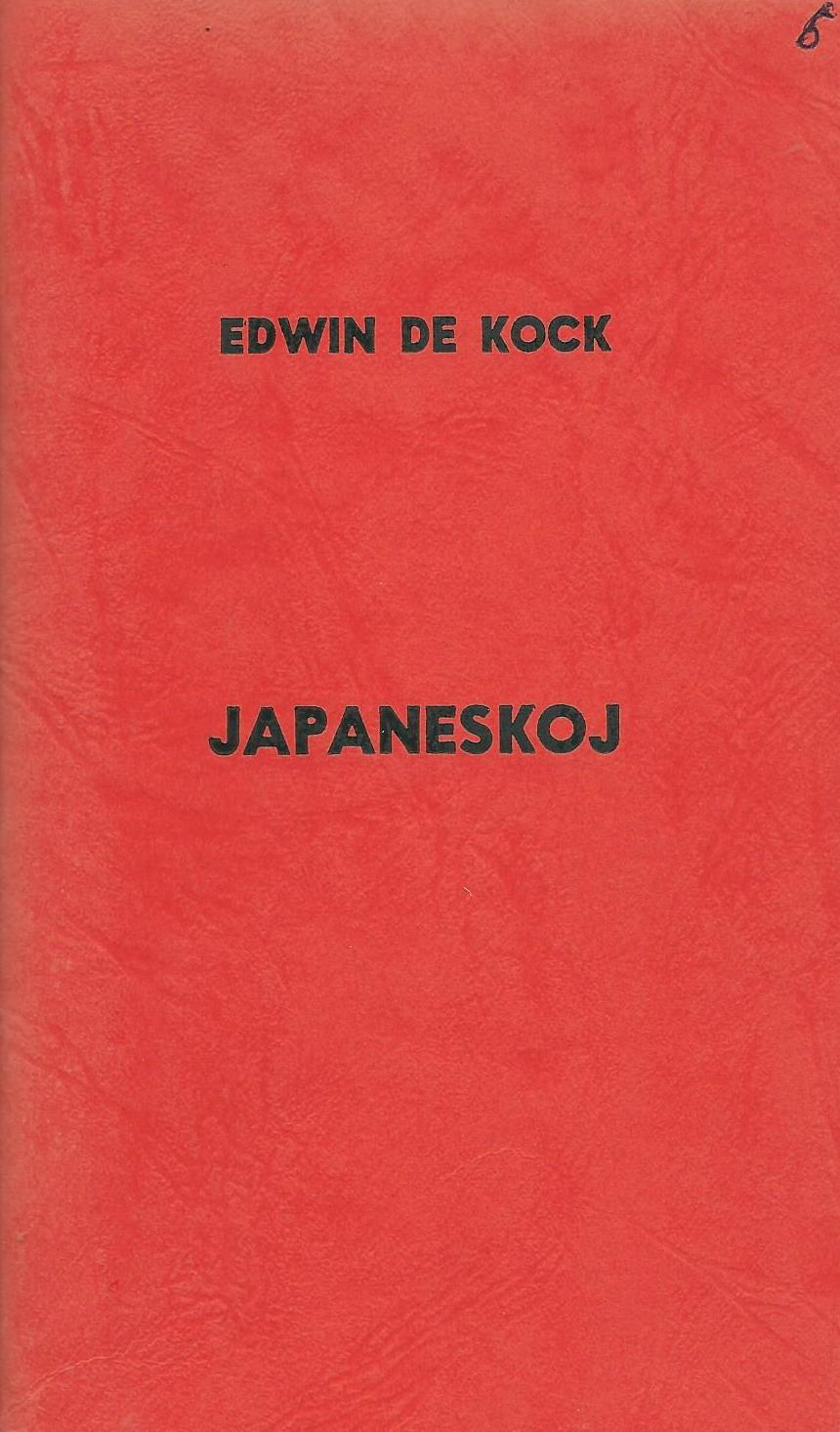 librokovrilo de "Japaneskoj"